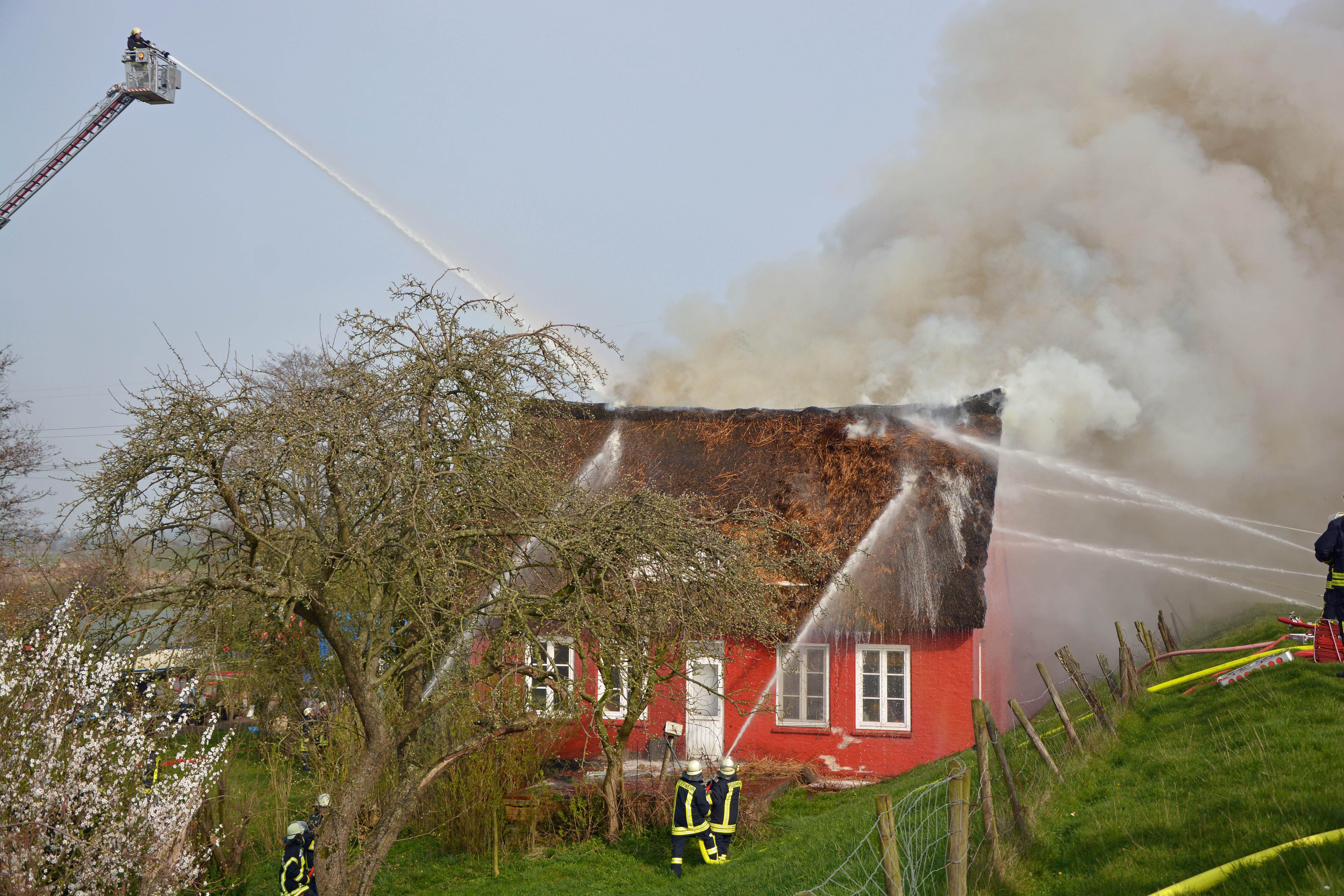 Brennendes Reetdachhaus mit starker Rauchentwicklung